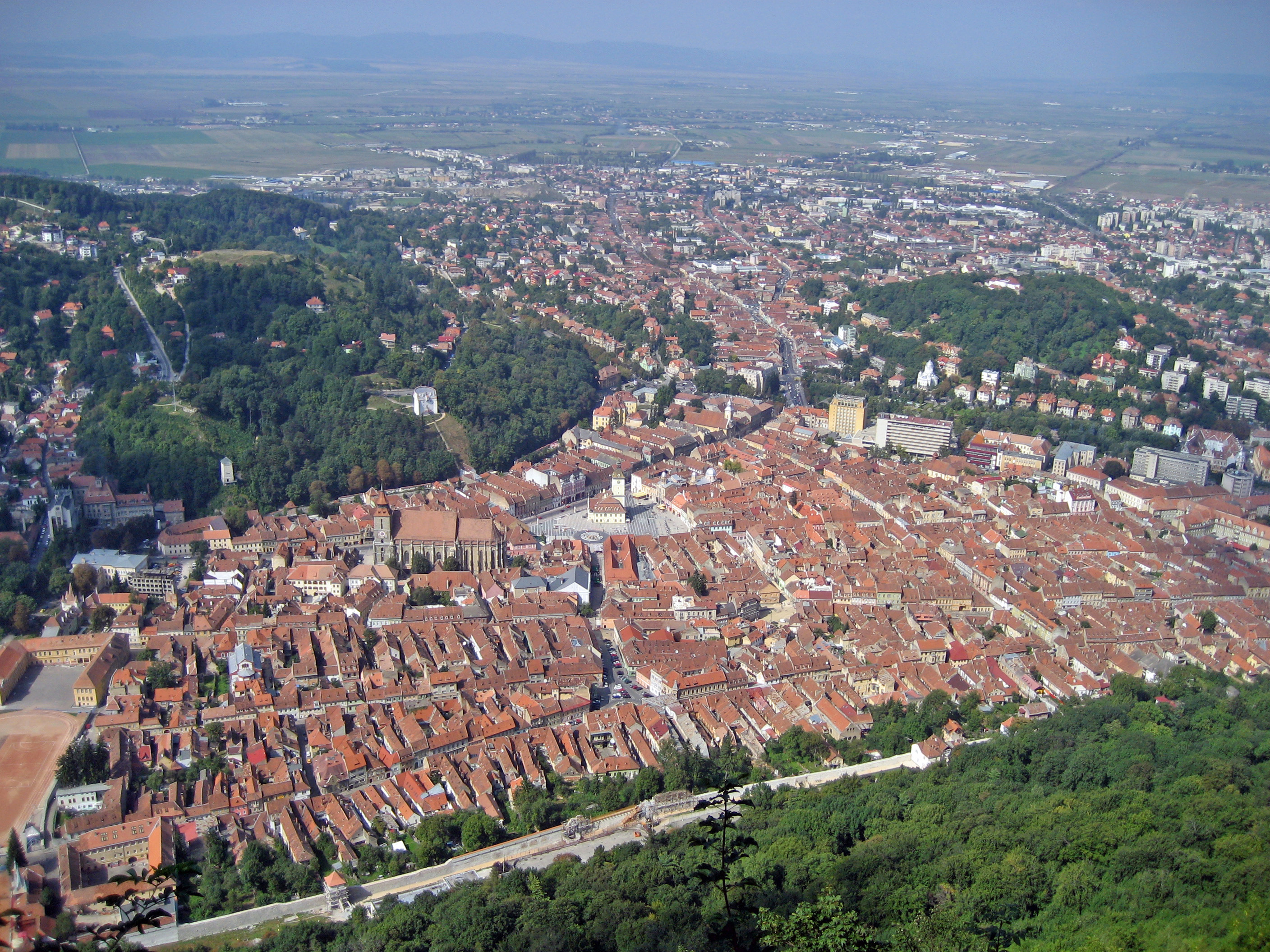 Braşov (Kronstadt), Romania